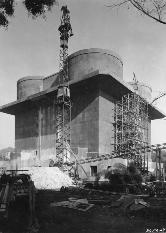 Bau eines Flak-Turms Für Luftabwehr und Luftschutz In einigen Luftgefährdeten deutschen Großstätten werden Grossbauten aus Beton und Stahl gebaut, die unter dem Namen "Flaktürme" volkstümlich geworden sind. In ihren Abmessungen, in der Menge des verbauten Materials und ihrer- trotz aller Schwierigkeiten - kurzen Bauzeit sind sie nur mit den U-Boot-Bunkern zu vergleichen. Mit der Errichtung dieser Bauten, die gleichermaßen der aktiven Luftabwehr wie dem Luftschutz der Bevölkerung dienen, hat das von Reichsminister Speer organisatorisch straff zusammengefaßte deutsche Bauschaffen in der Heimat eine seiner bedeutsamen Leistungen während des Krieges vollbracht. Die Planung dieser von Prof. Tamms entworfenen Bauten steuert, in Zusammenarbeit mit der Luftwaffe, das Amt Bau des Reichsministeriums für Rüstung und Kriegsproduktion; die bautechnische Durchführung obliegt dem Hauptausschuss Bau beim Reichsminister für Rüstung und Kriegsproduktion. Aufnahmen: Gerlach